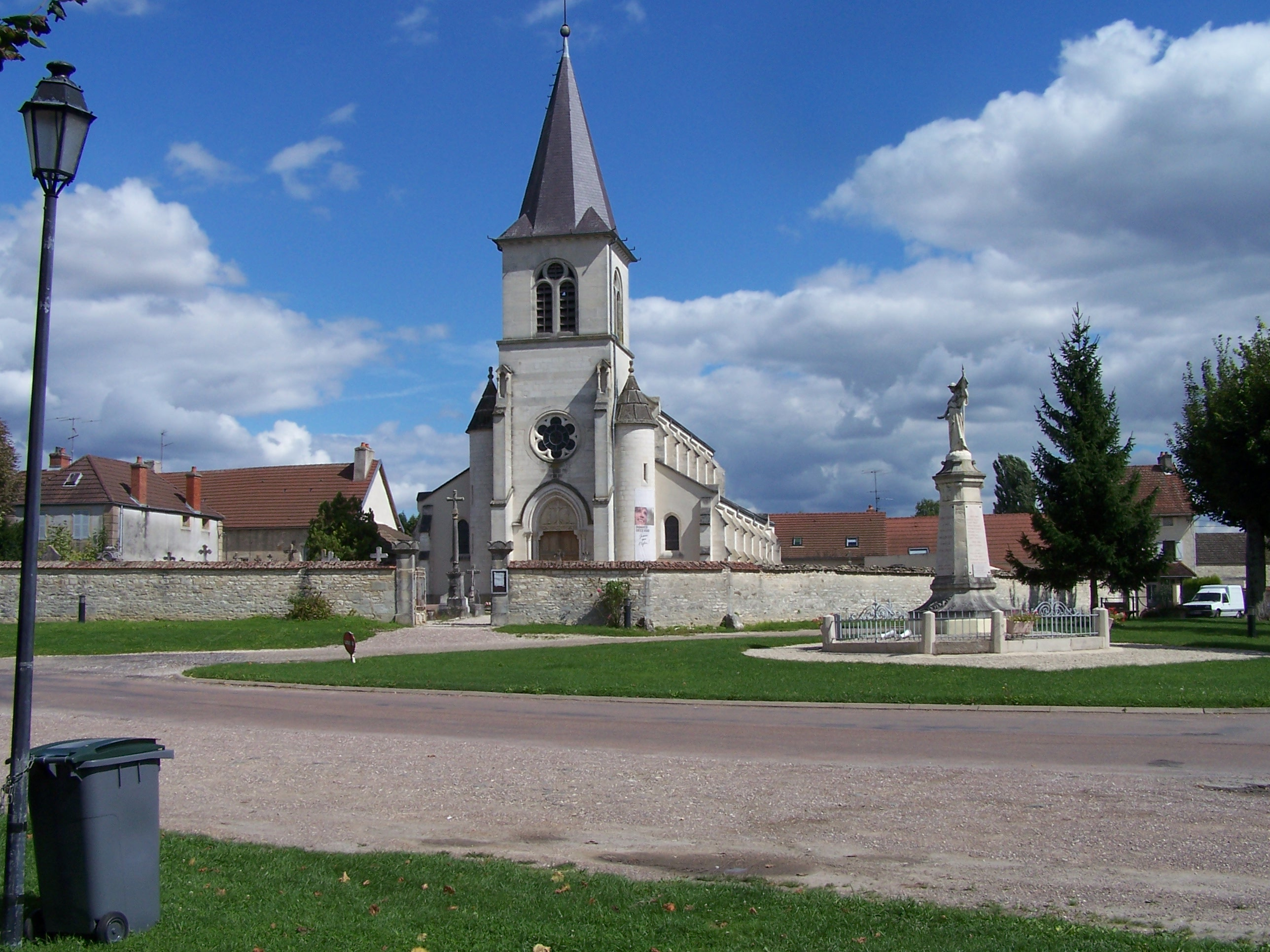 EGLISE PAROISSIALE DE LA COMMUNE DE SAINT JULIEN (21490) France